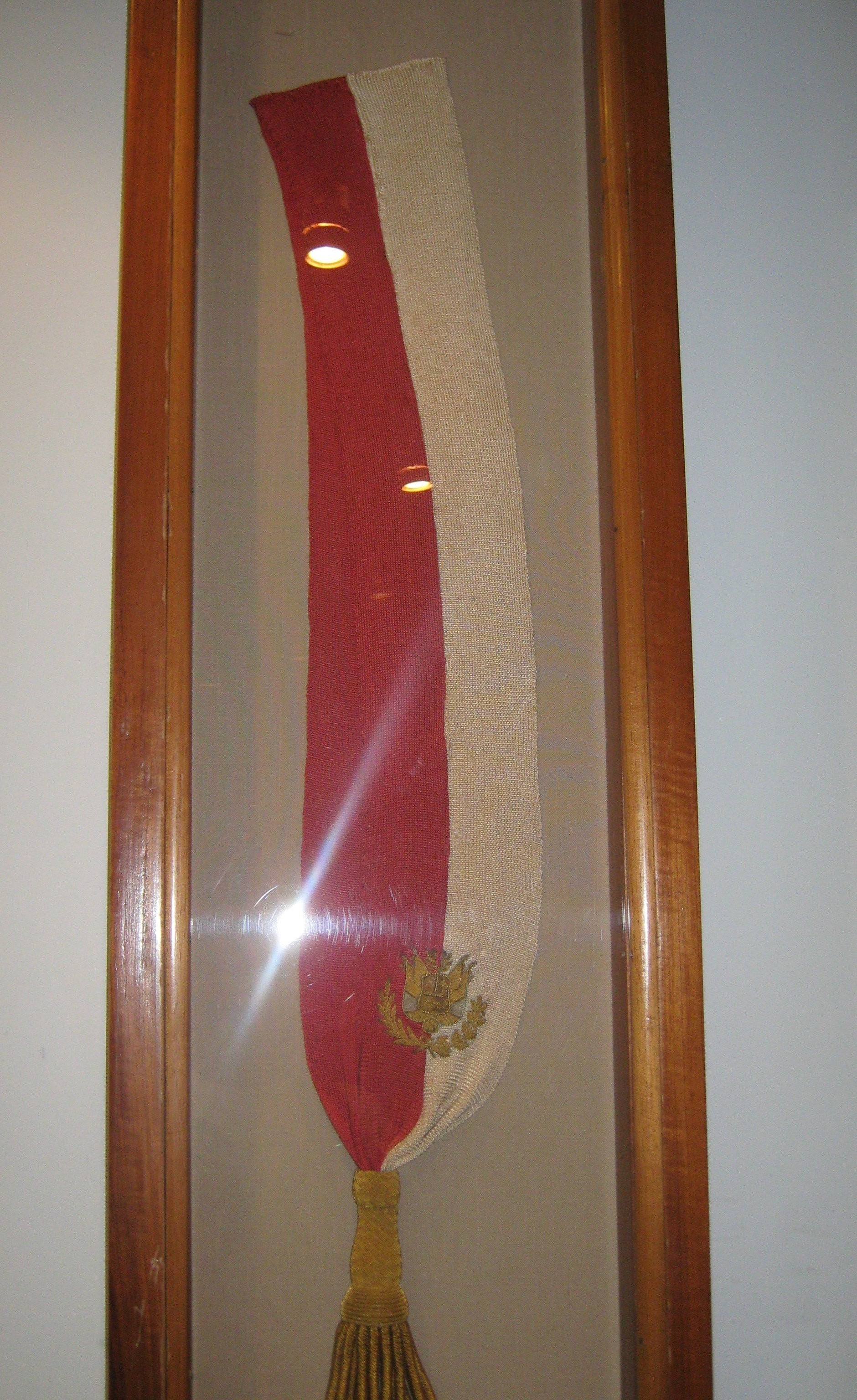 Banda Presidencial del Sanchez Cerro durante su primer gobierno.